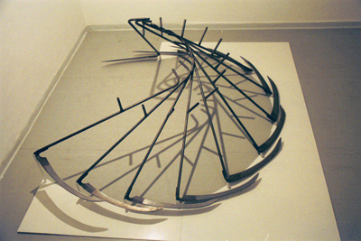 Installation